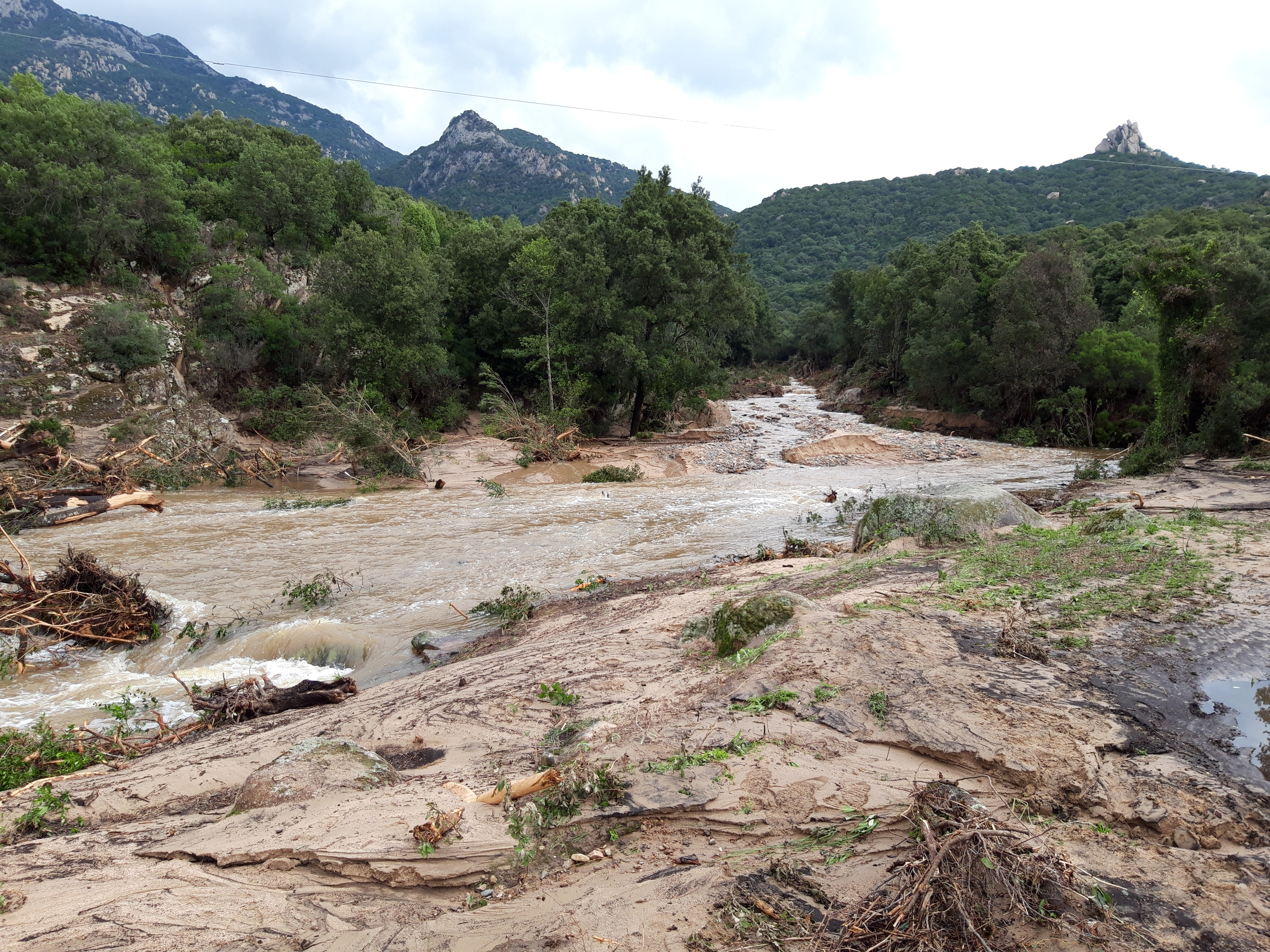 Danni dell'alluvione della notte del 10 ottobre 2018 a Sa Spindua (Pantaleo, Santadi)